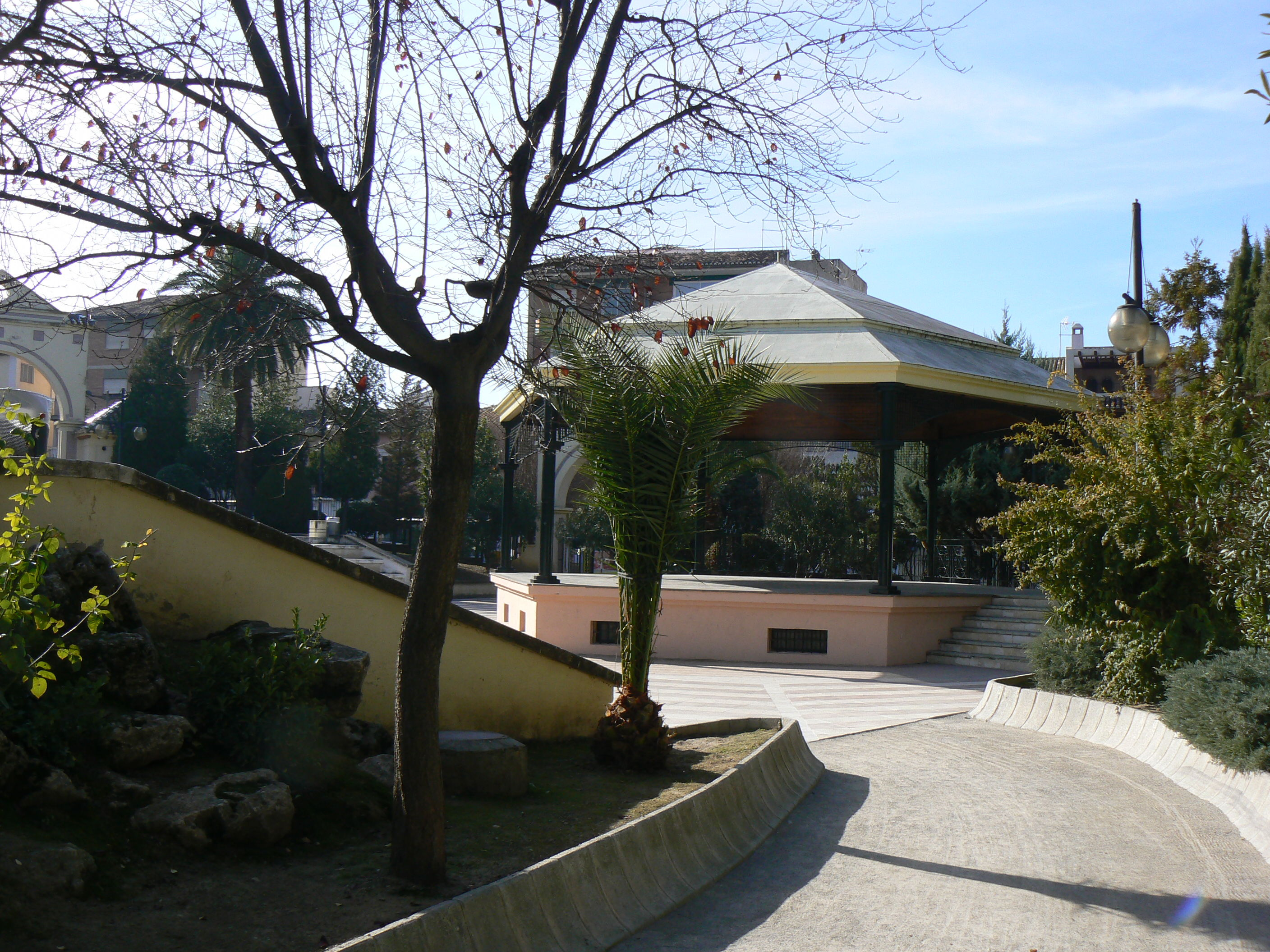 Templete de la Música en el interior del Parque de La Encina de La Zubia. Esporádicamente se realizan conciertos y actividades municipales en él. Una vez al año la prestigiosa Orquesta Ciudad de Granada da un concierto en el templete, para el cual se bloquea el tráfico de la ciudad en las calles colindantes al parque. La acceso a dicho concierto suele hacerse a través de invitaciones. Siempre tiene una gran aceptación del público y las gradas que rodean al templete se llenan de los ciudadanos de La Zubia.